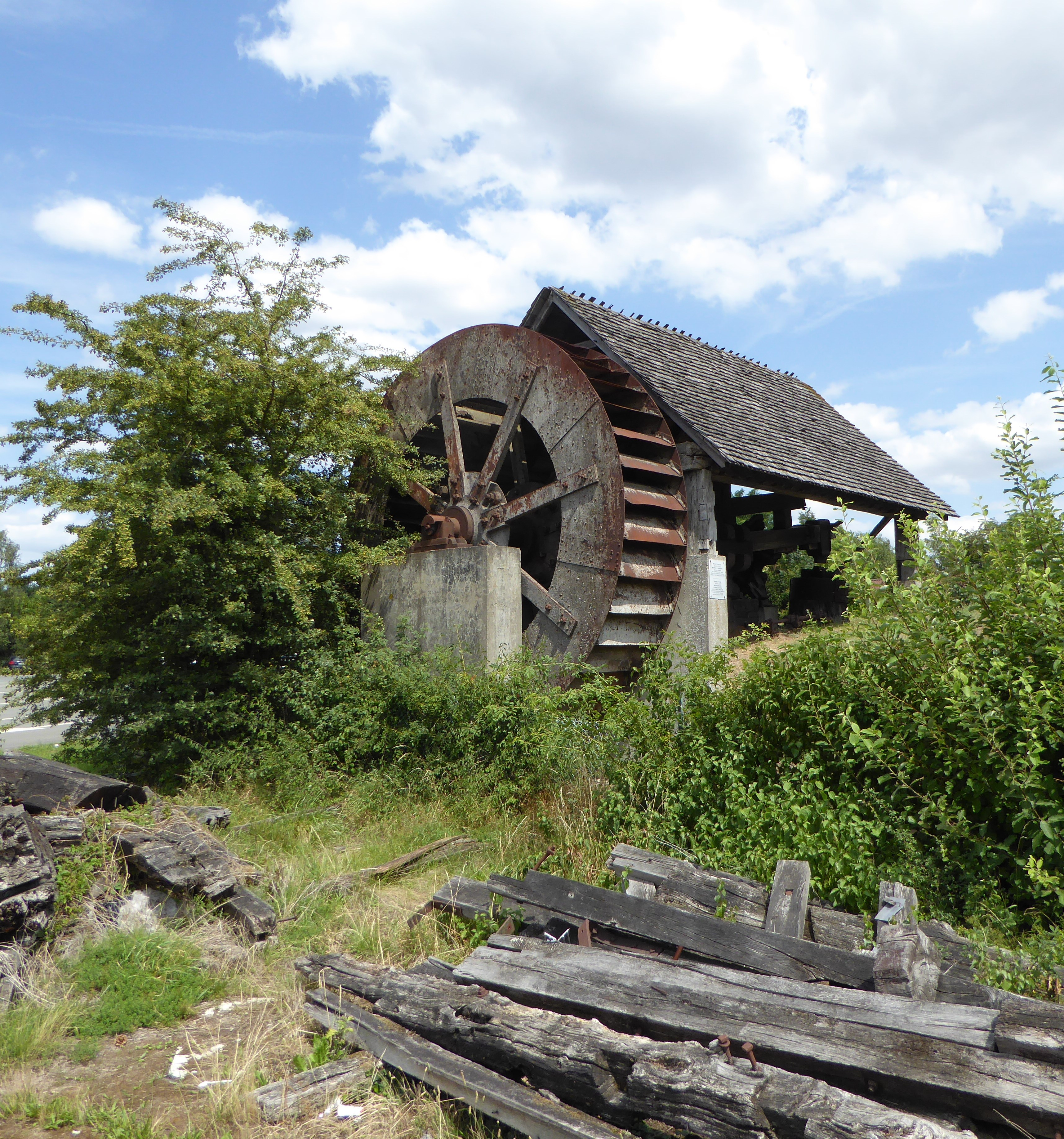 Moulin à eau du Musée des moulins de Villeneuve-d'Ascq,Nord)